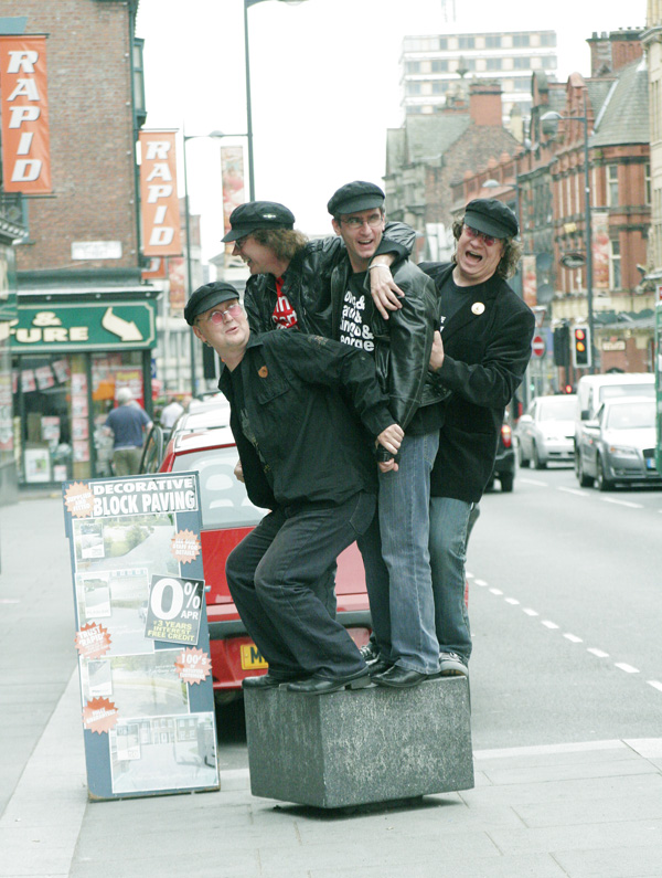 Zdjęcie wykonane podczas kolejnego koncertowego pobytu zespołu The Bootels w Liverpoolu